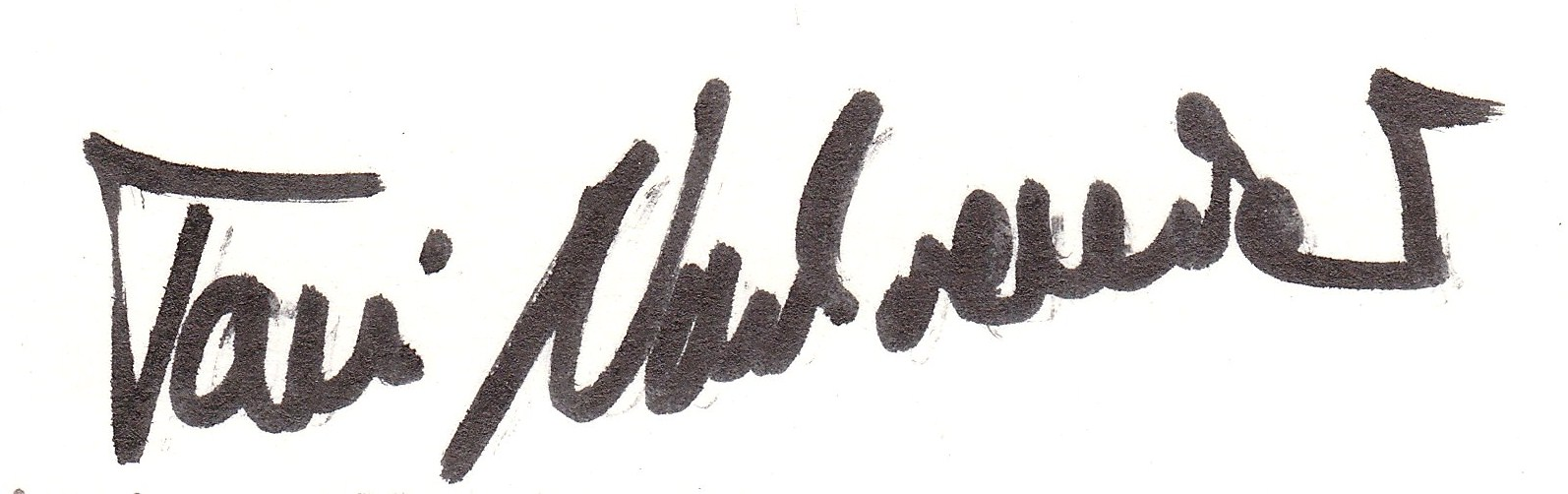 Autogramm des ehem. Bundesliga-Spielers von 1979